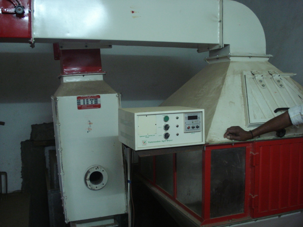 ഏലക്കായ് ഉണക്കുന്ന മെഷിൻ